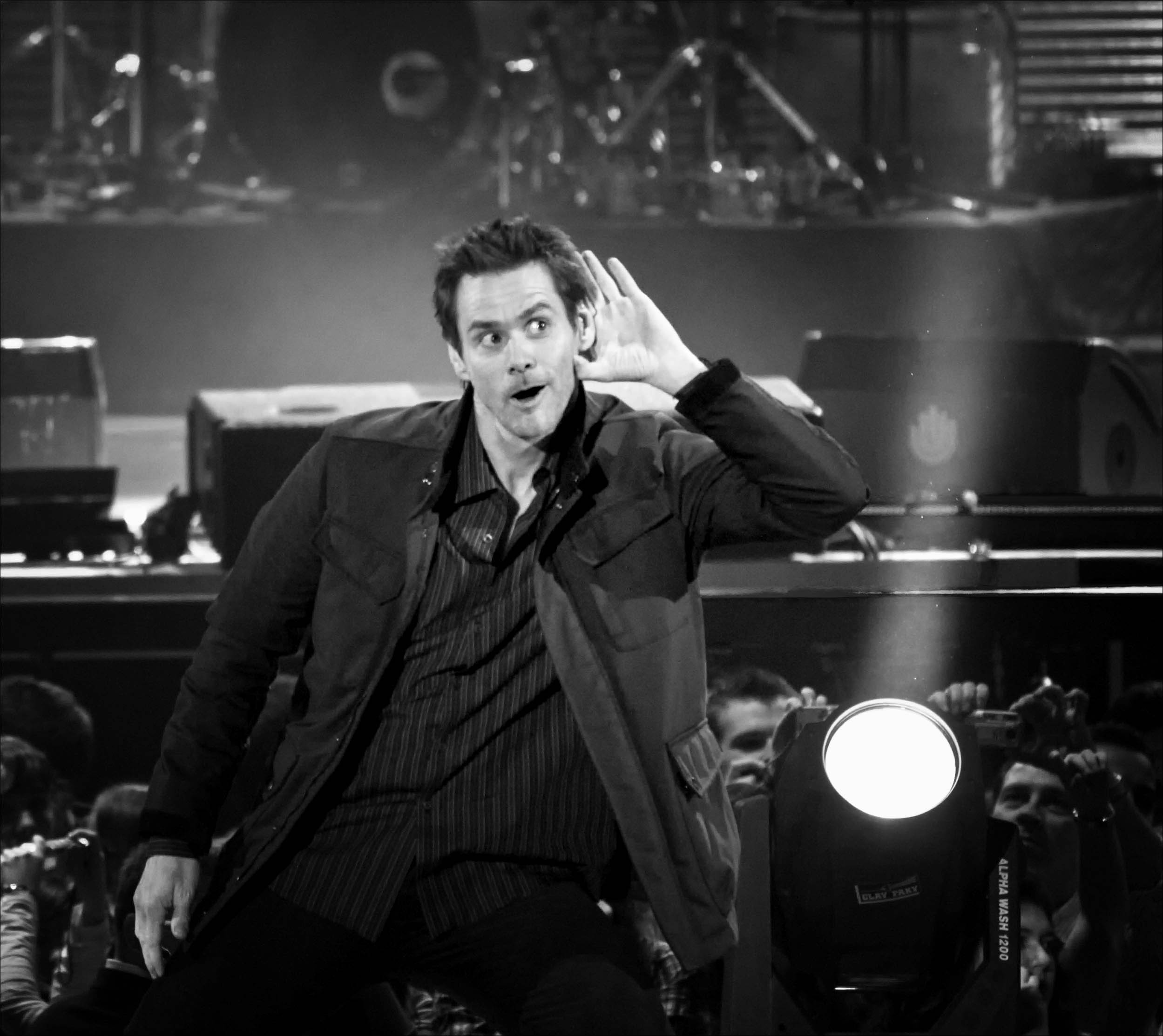 Jim Carrey, Premios 40 Principales Palacio de los Deportes, 12.12.08 Madrid, Espana